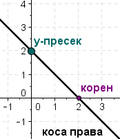 Линеарна функција